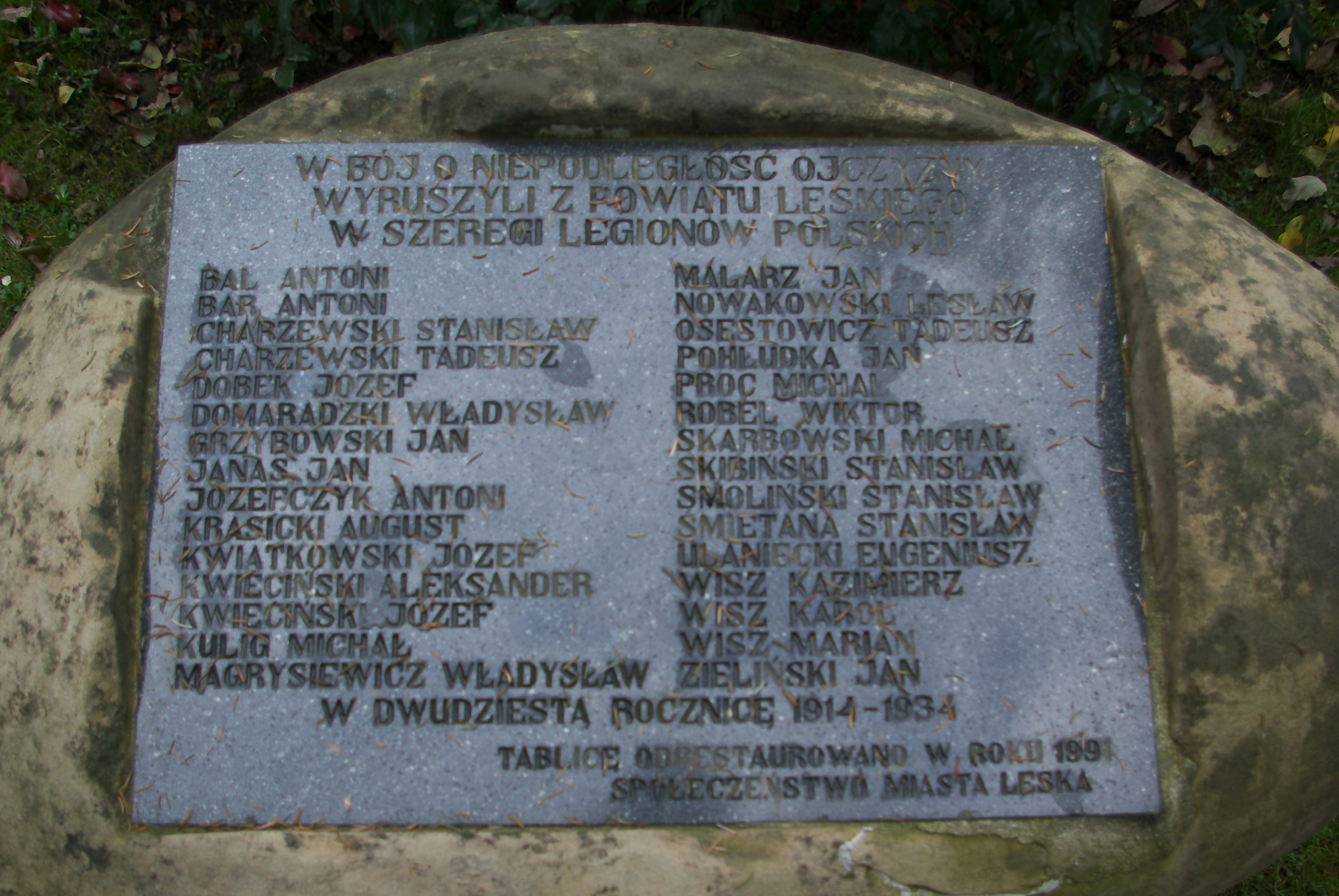 Pomnik upamiętniający w Lesku wyruszających do Legionów Polski z 1914. Ustanowiony w 1934, odnowiony w 1991.